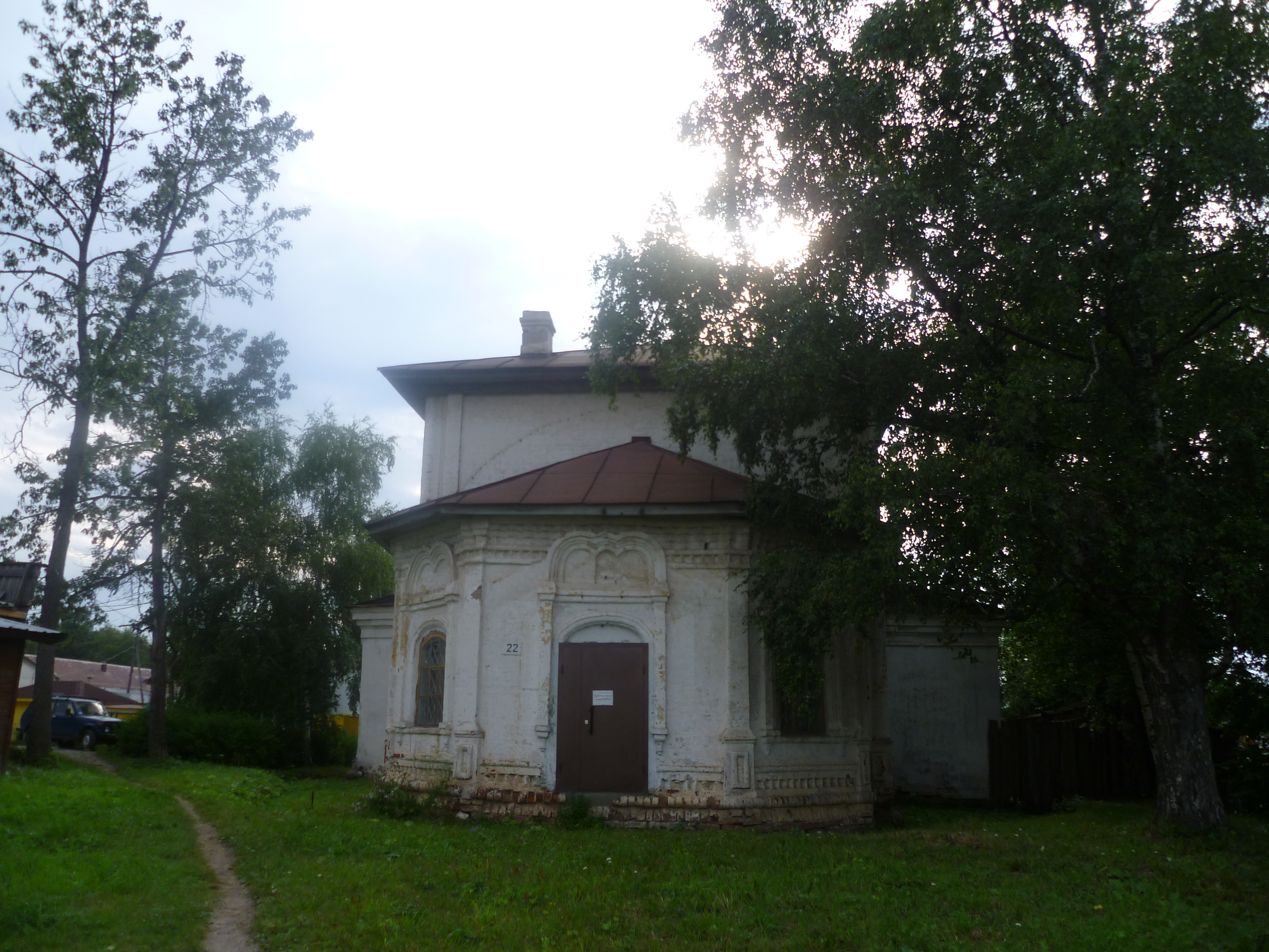 Церковь Петра и Павла (Вологодская область, Белозерск, улица Фрунзе, 22)